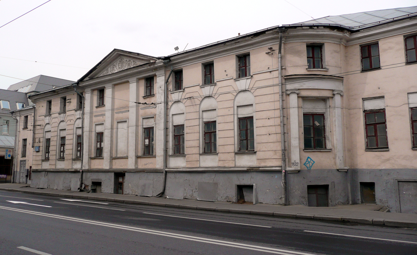 Дом Савиных на Спартаковской, 3